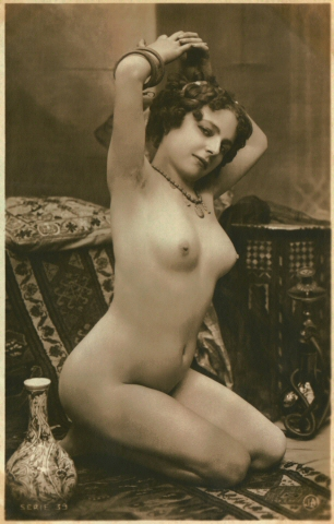 Fernande